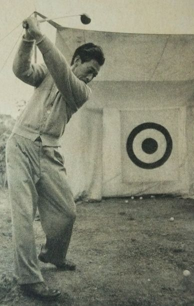 小林秀雄